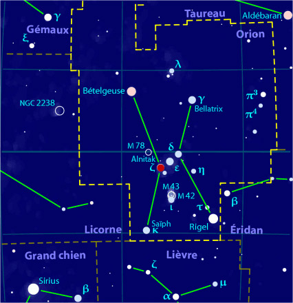 Localisation de Alnitak dans la constellation d'Orion.